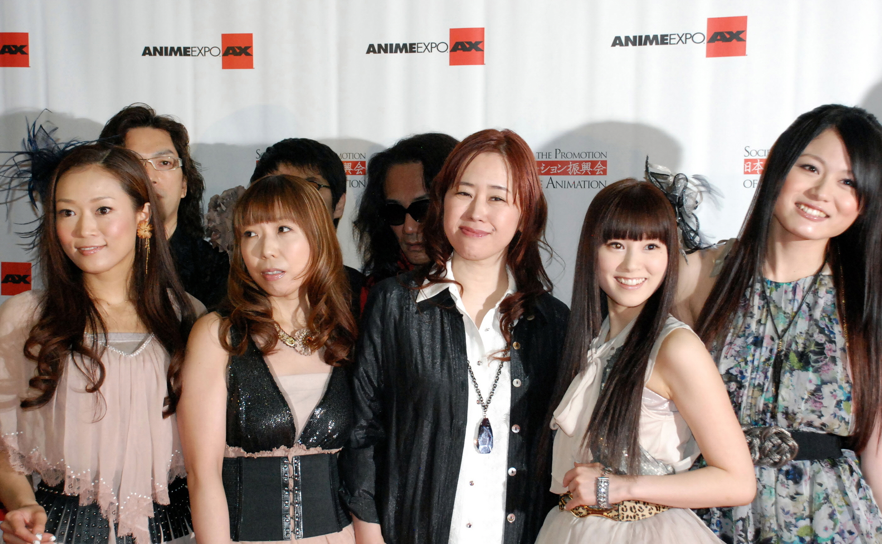 Osea Yuki Kajiura y su sequito real.